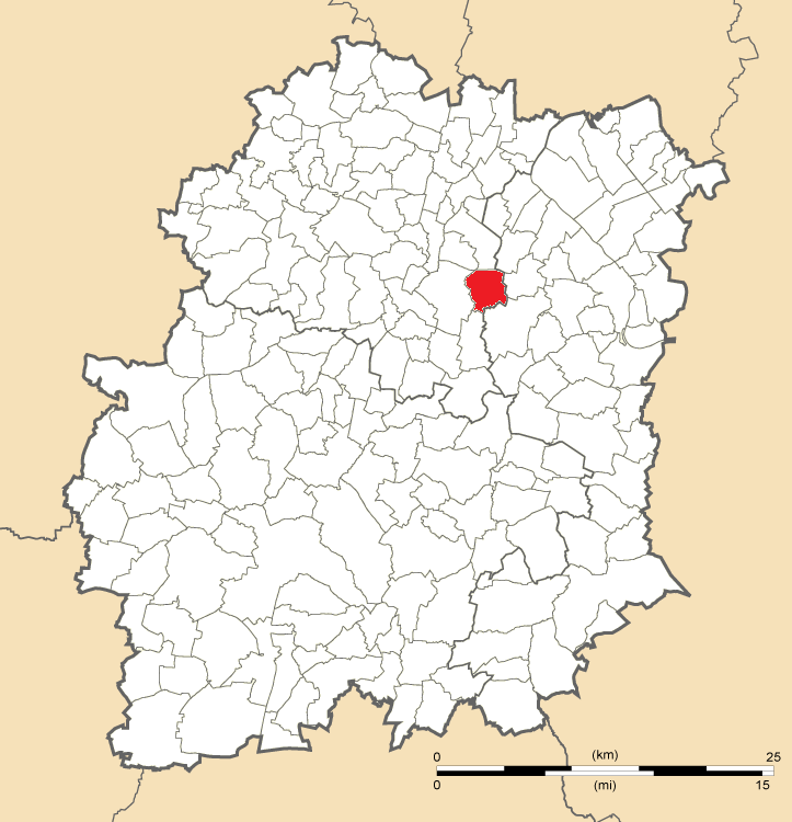 Carte de position du Plessis-Pâté en Essonne (91)